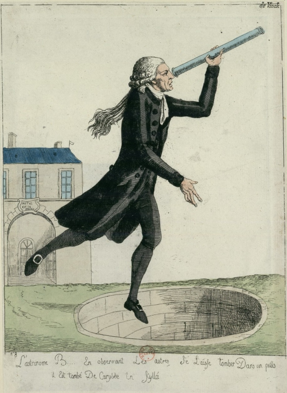 L'astronome Bailly, en observant les astres, se laisse tomber dans un puits. Eau-forte anonyme coloriée. (Bibliothèque nationale de France, Paris.)